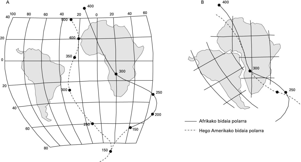 A) Hego Amerika eta Afrikako adin ezberdineko arroken magnetismoa aztertuz sortzen diren bidaia polarraren kurbak (adinak Mu-tan). B) Kurbak elkartu egiten dira adin bakoitzean kontinenteek izan duten kokapenera eramanez